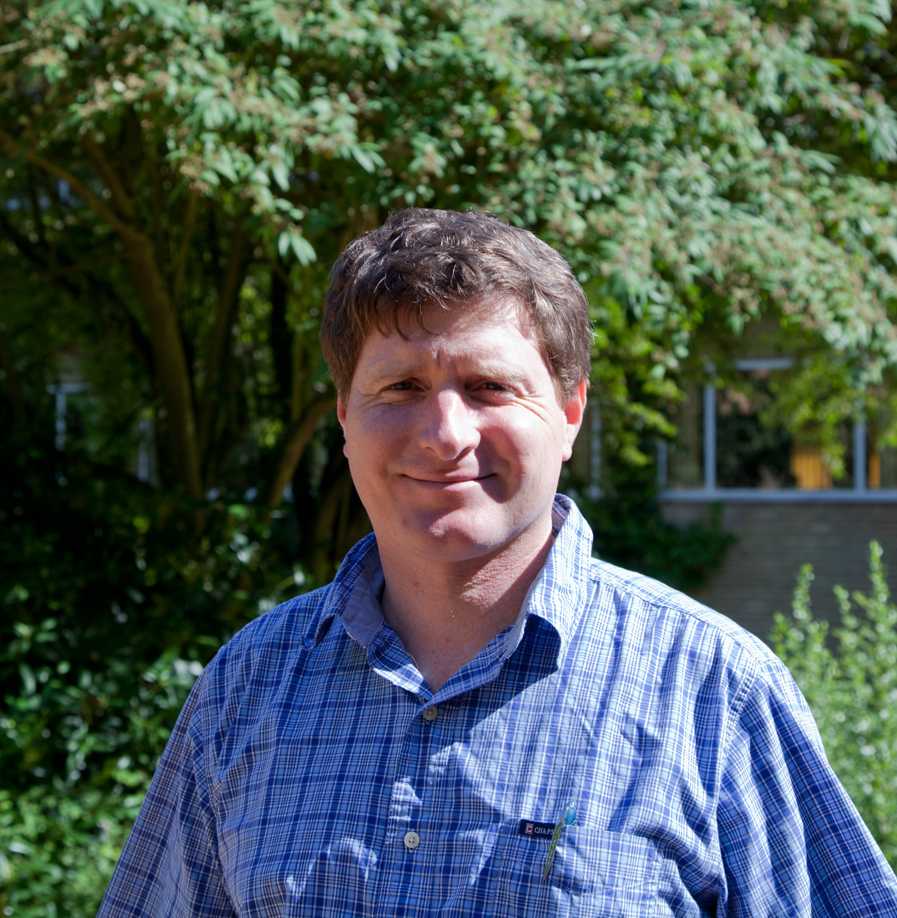 Matematikeren Ian Agol på Aarhus Universitet, august 2012